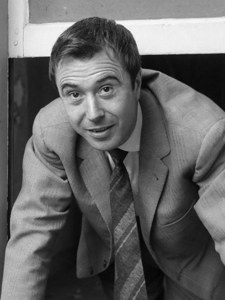 Woning voor Paul Cammermans (Telegraaf). Poserend met zijn echtgenote? Cammermans speelde in 1961 en 1962 bij het toneelgezelschap "De Nederlandse Comedie" 22 september 1961